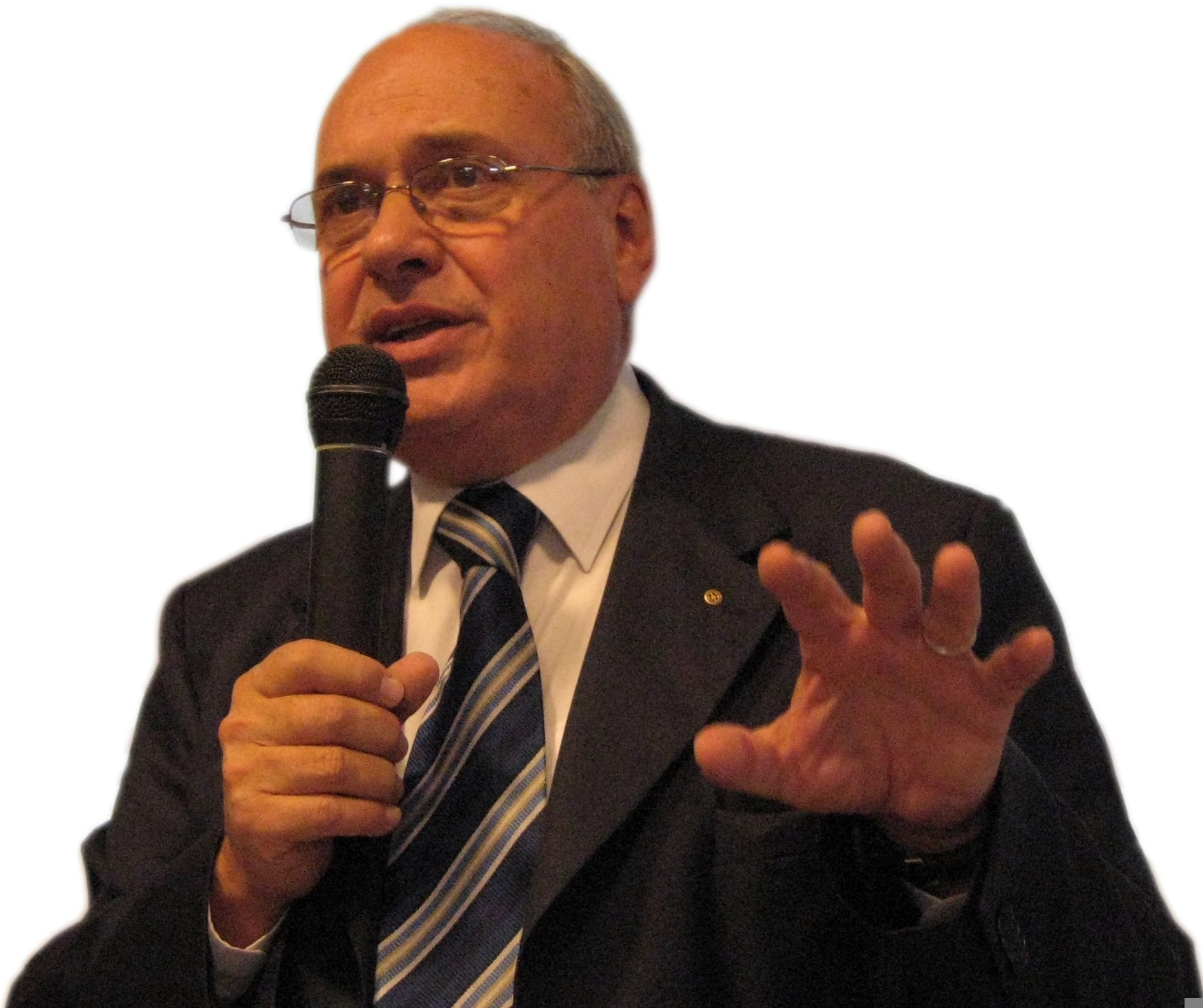 ritratto Gianpiero Gamaleri